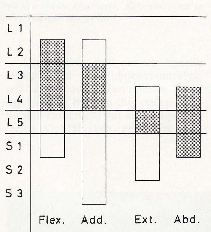 Segmentale Innervation der Hüftmuskelgruppen. Die wichtigen spinalen Segmente sind schraffiert.